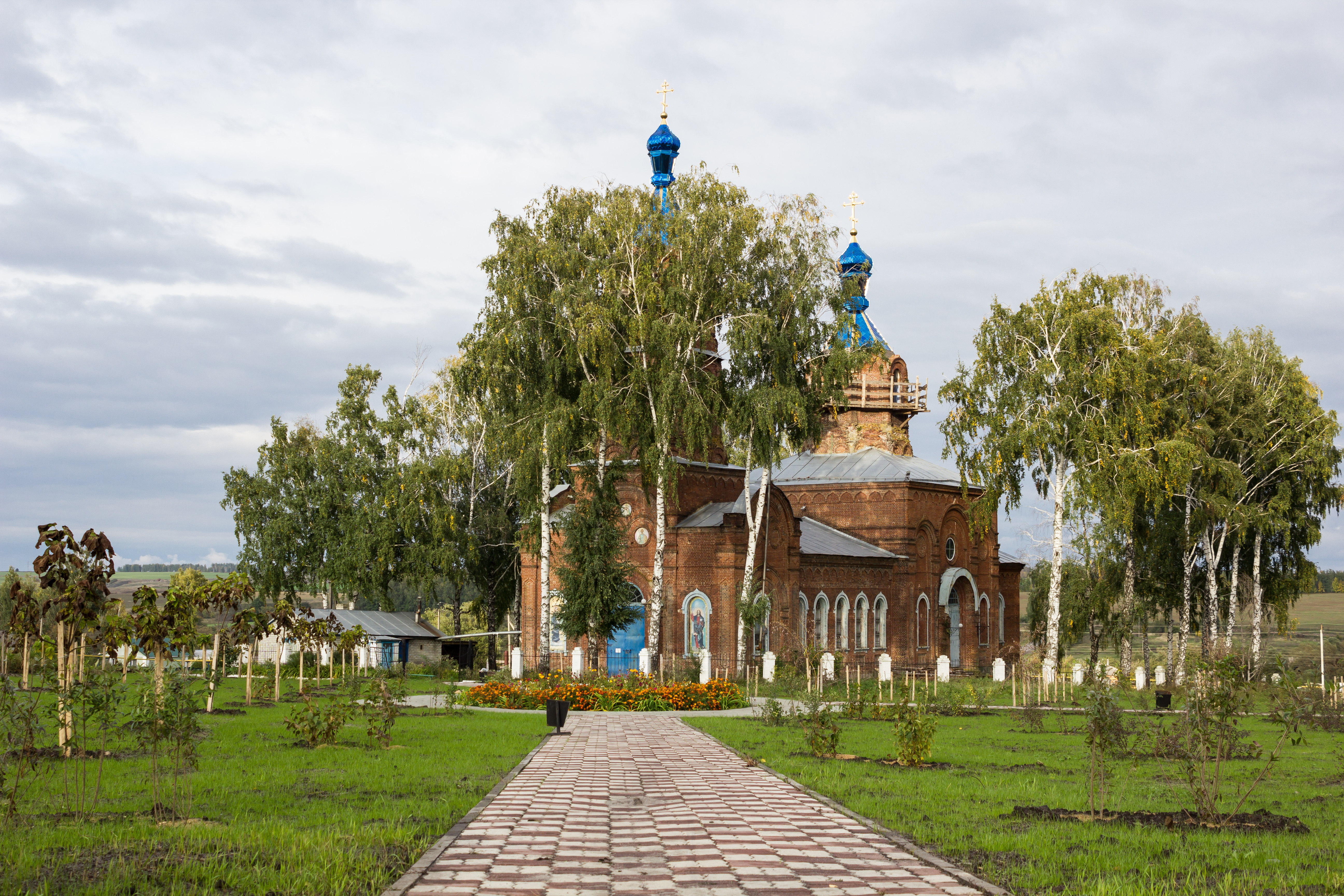 Дмитриевская церковь (Белгородская область, Старый Оскол, село Дмитриевка)